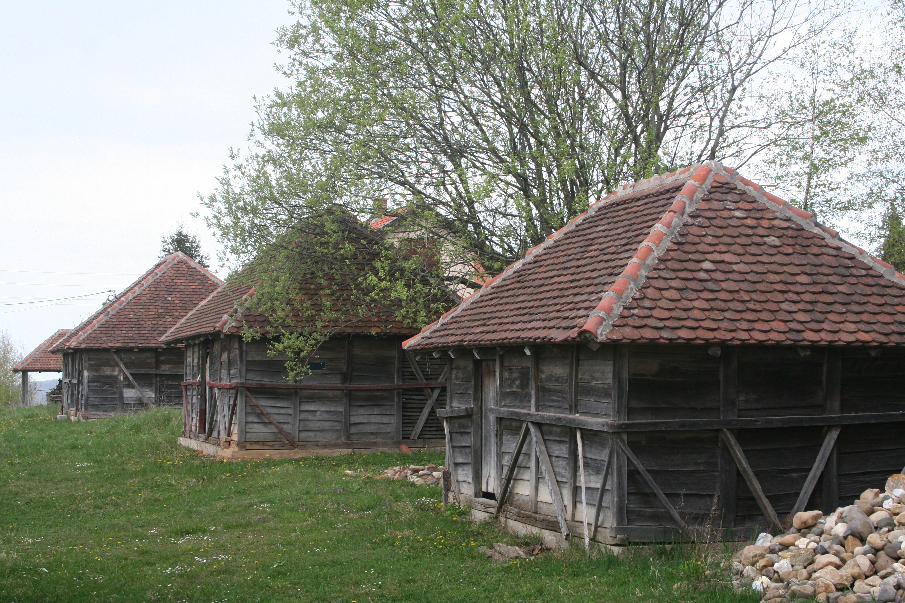 Etno selo na Mačkovom kamenu